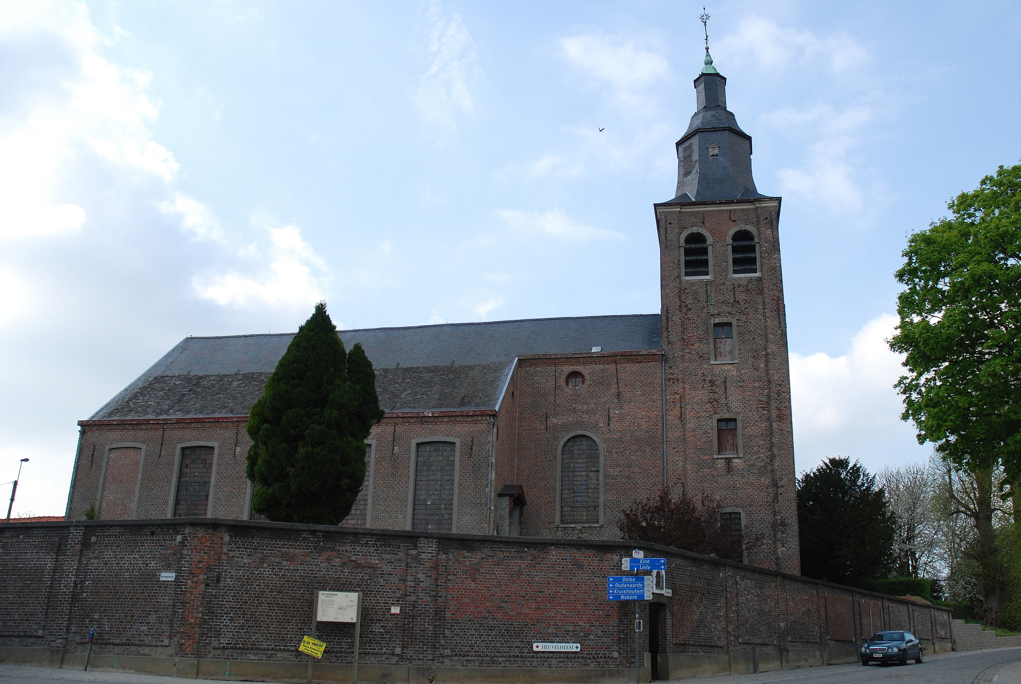 De Sint-Machutuskerk te Wannegem-Lede, België